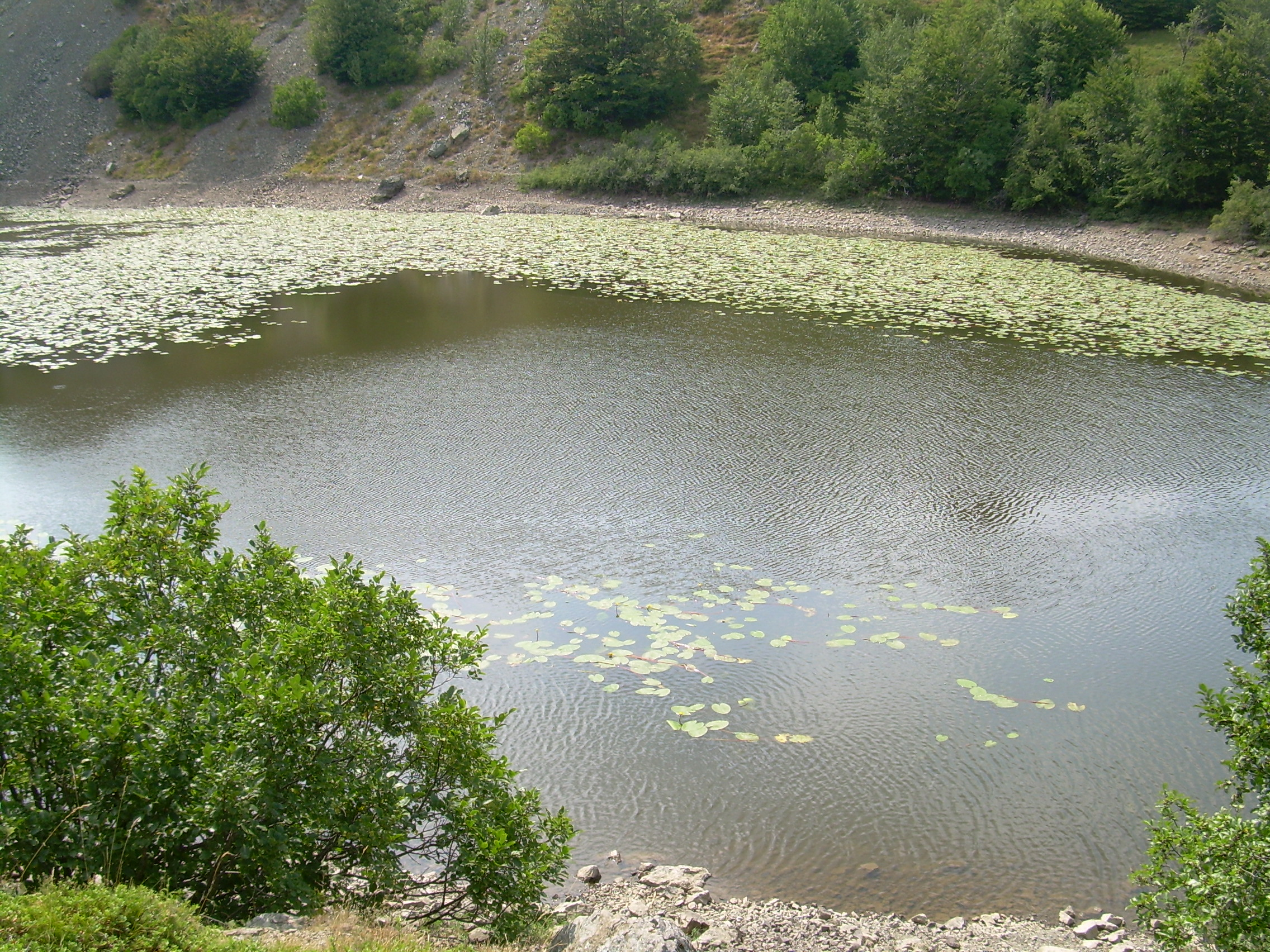 Il Lago Bino Maggiore è un lago glaciale nell'Appennino Ligure, in provincia di Piacenza. È accompagnato dal piccolo Lago Bino Minore che si è diviso dal maggiore dopo una frana.